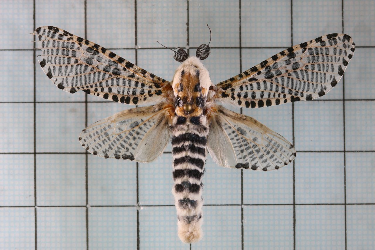 Zeuzera multistrigata Moore 1881 大豹斑蠹蛾 鞍2:P.26,Pl.37-12